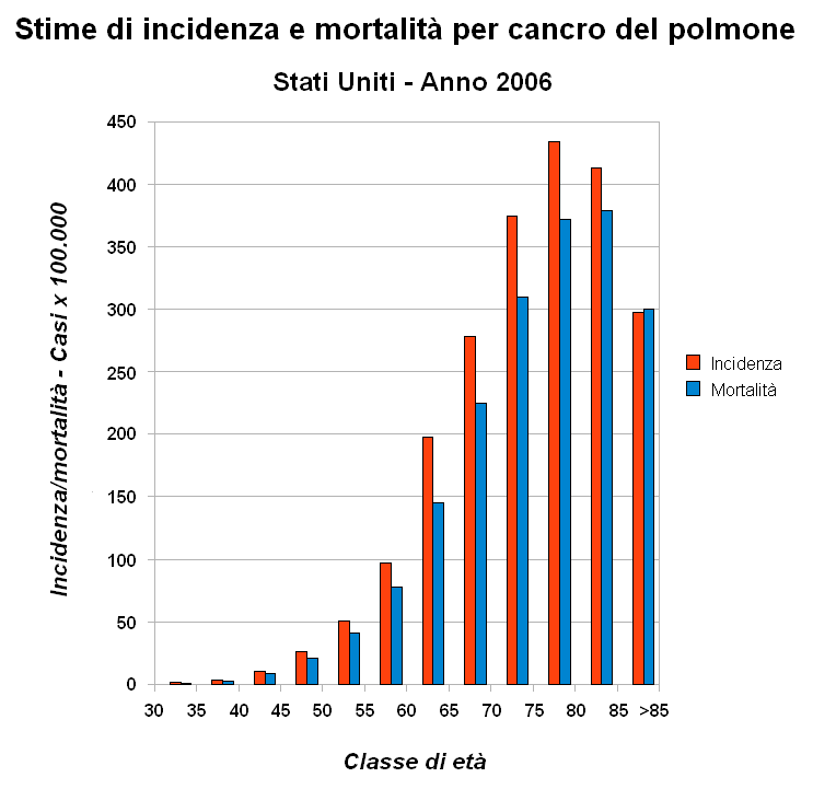 Prova provvisoria per incidenza e mortalità per classe di età di cancro del polmone